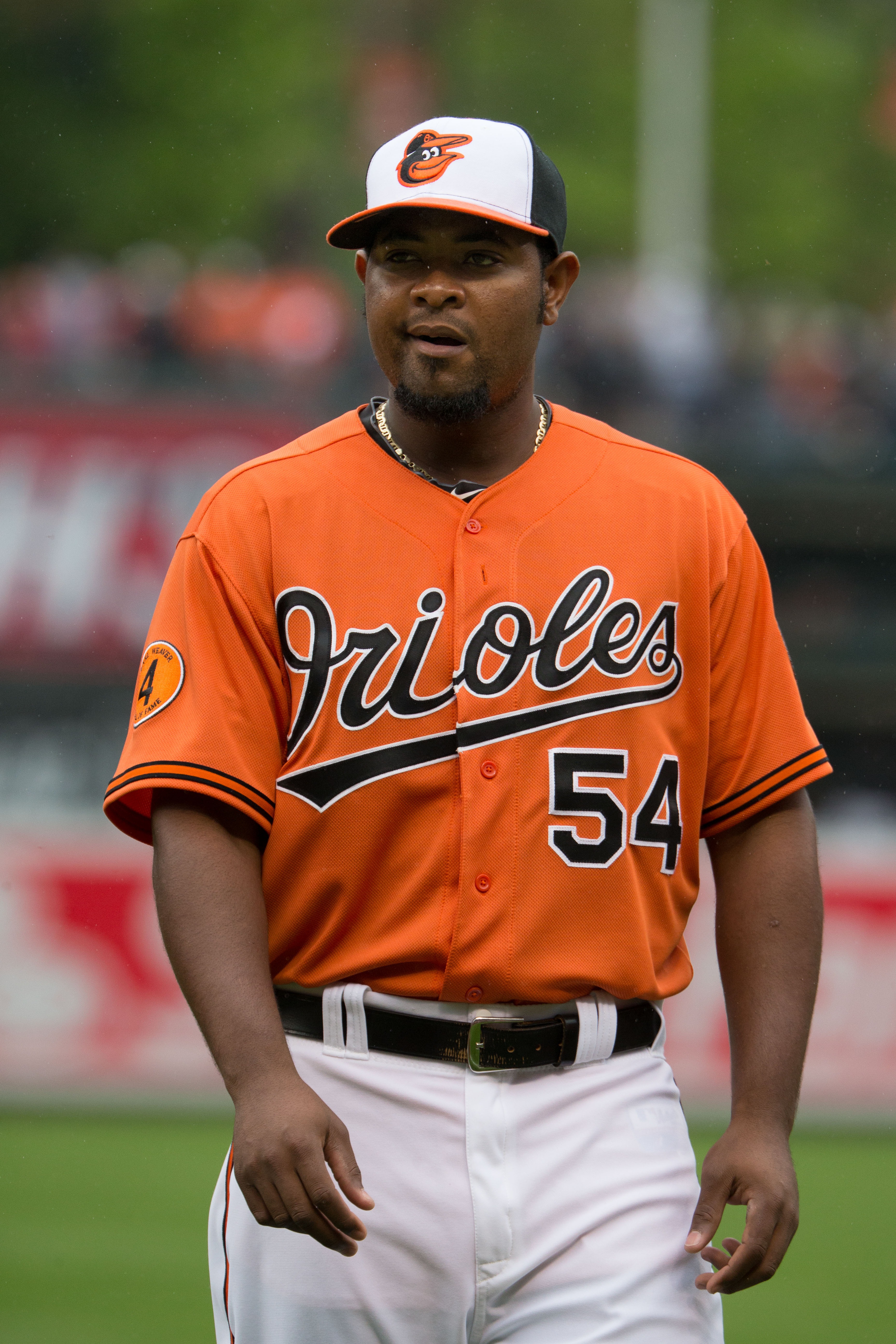 Yamaico Navarro